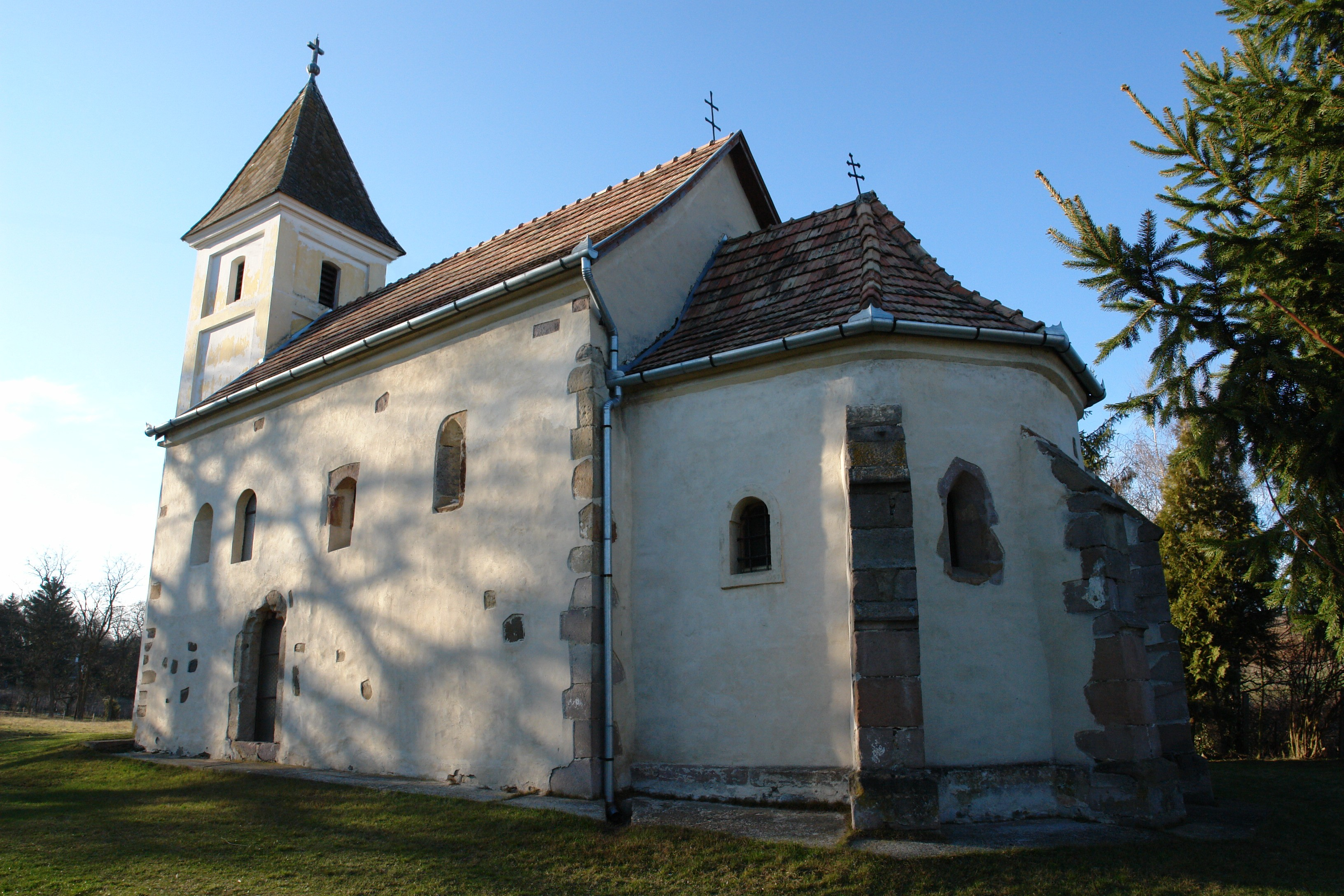 Csesztve